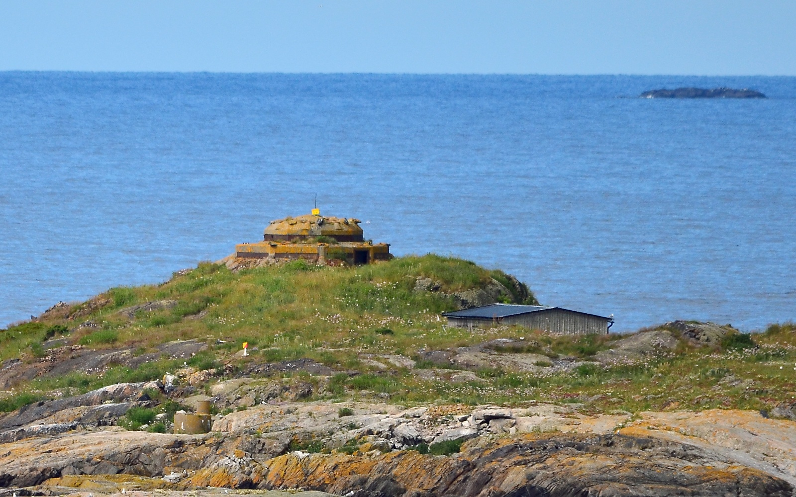 Bebyggelsen på Altarskär, Gunnarstenarna. En bevakningsbunker och en liten stuga.